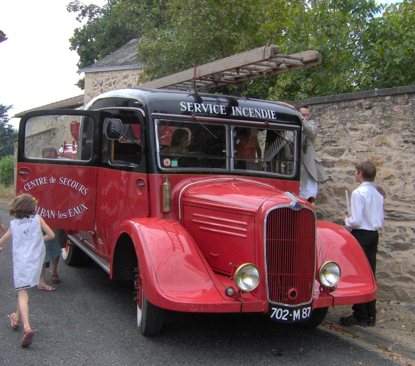 véhicule Laffly BSRC3 de 1938 Collection Vignéras à Châlus